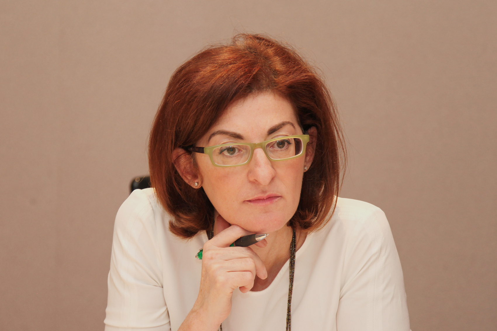 Maite Pagazaurtundua Pagaza MEP UPYD buzon joseba alde diputada parlamento europeo basta ya eta